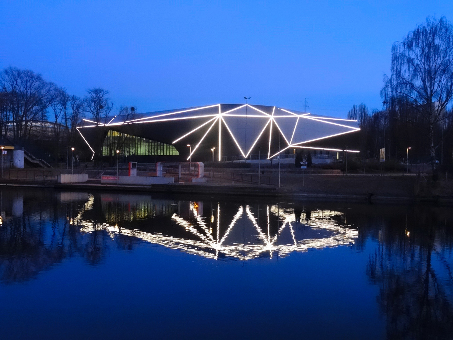 Sztuczne lodowisko "Torbyd" w Bydgoszczy, ul. Toruńska 59